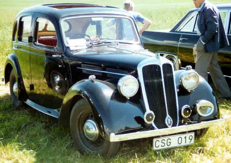 Standard Twelve 4-Door Saloon 1937